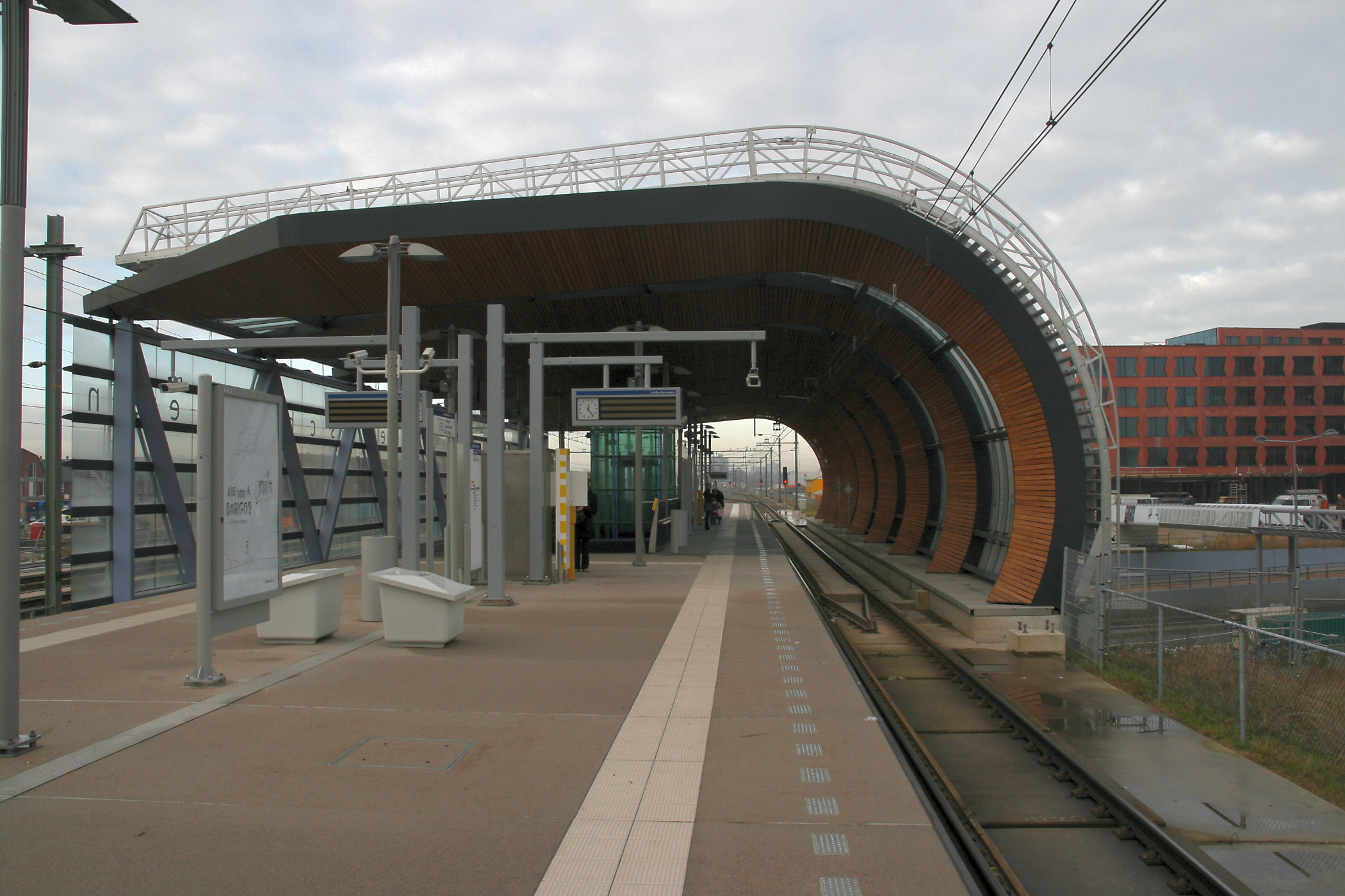 Randstadrail: station Leidschenveen